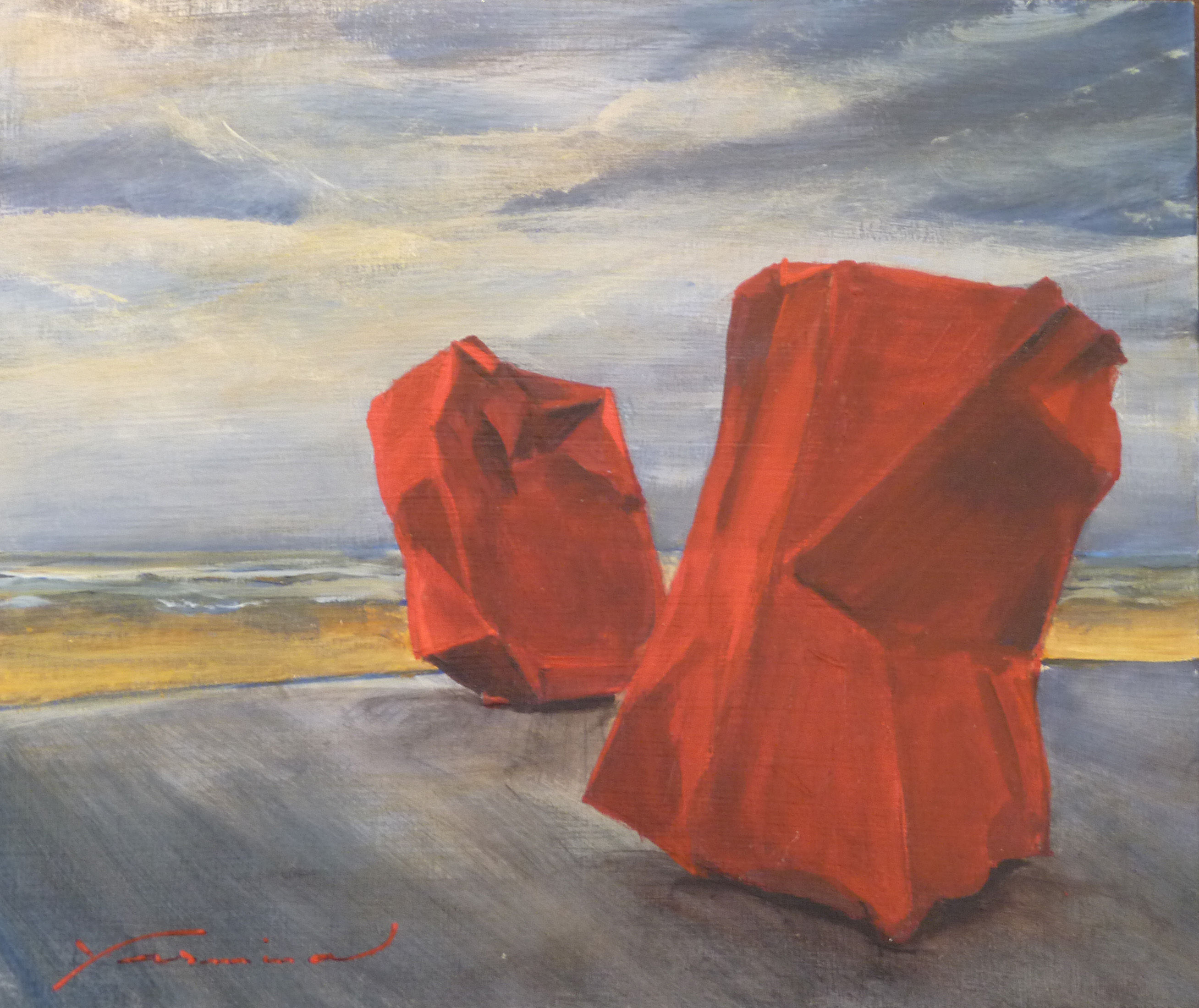 Artistieke impressie door de Belgische kunstschilderes Yasmina van dit werk van Arne Quinze op de zeedeijk van Oostende.